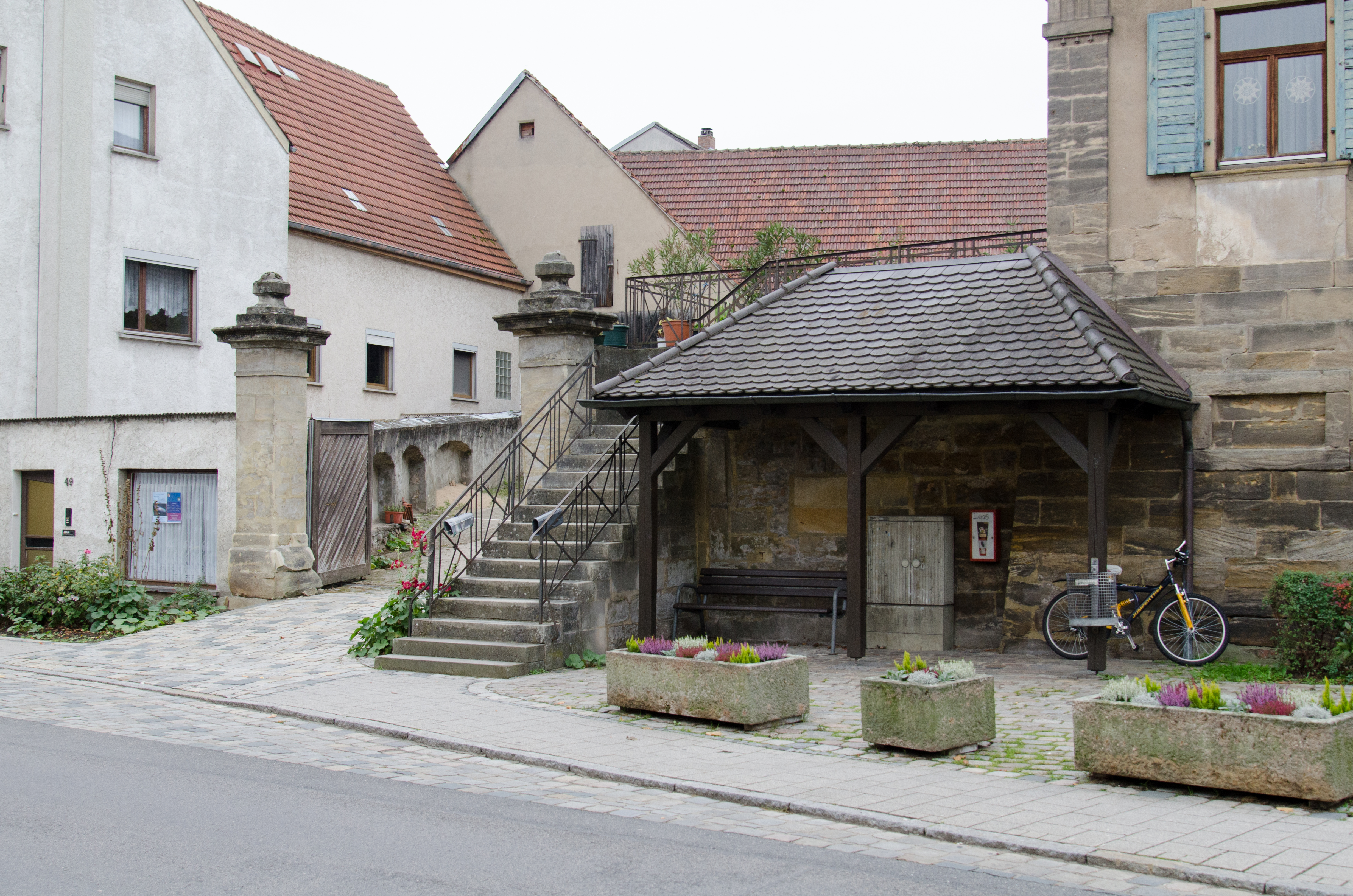 Bischberg, Hauptstraße 51